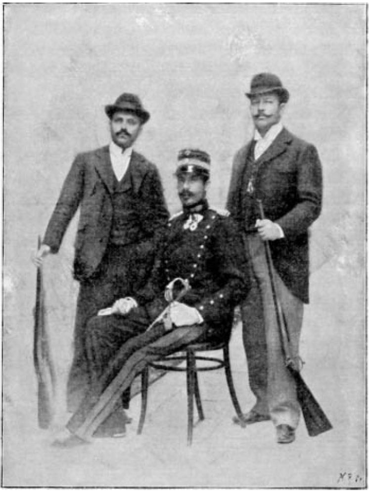 Olympiasieger 1896